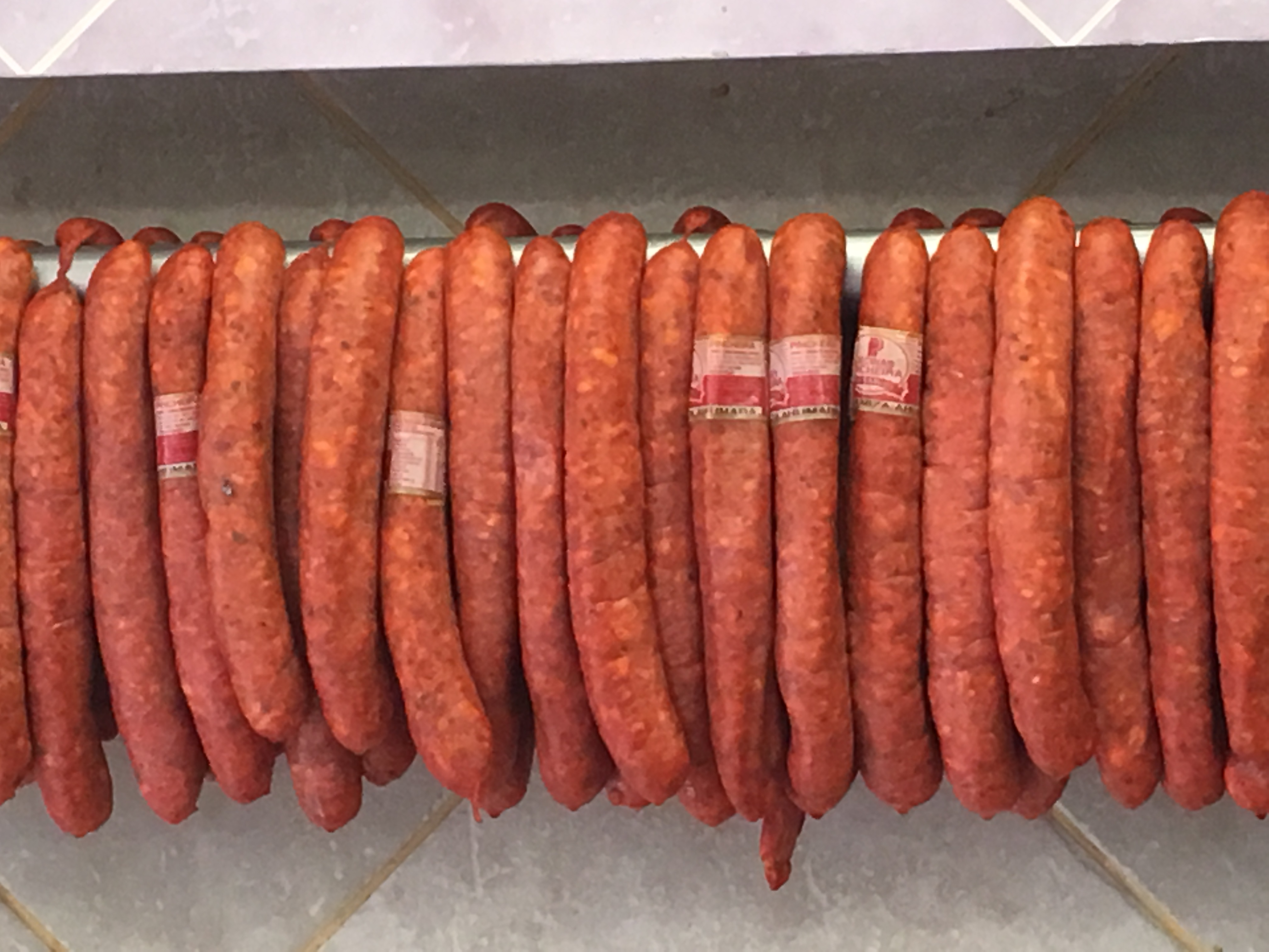 Longanizas en una carnicería de San Carlos,Chile.